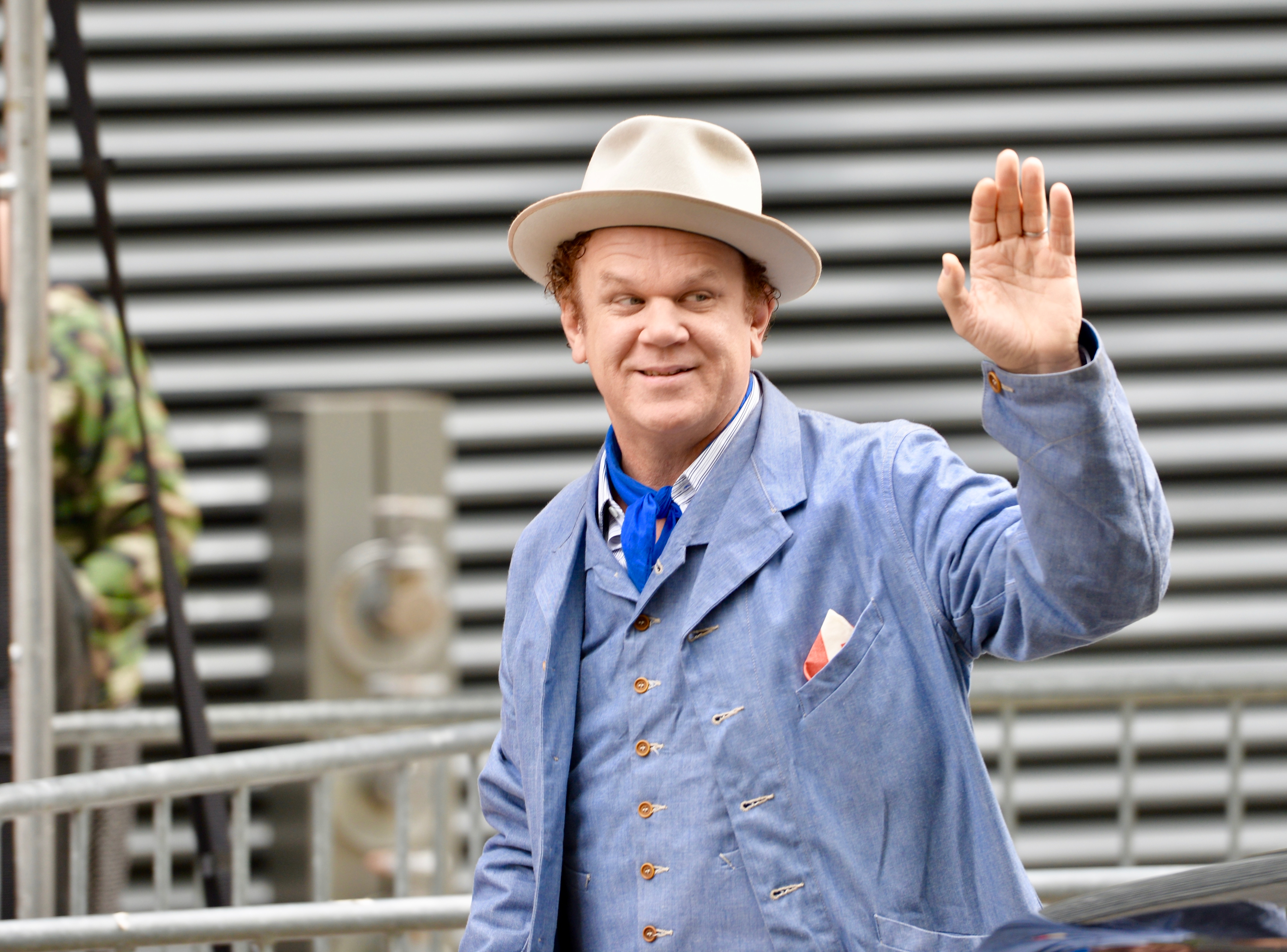 TIFF 2018 - Sister Brothers